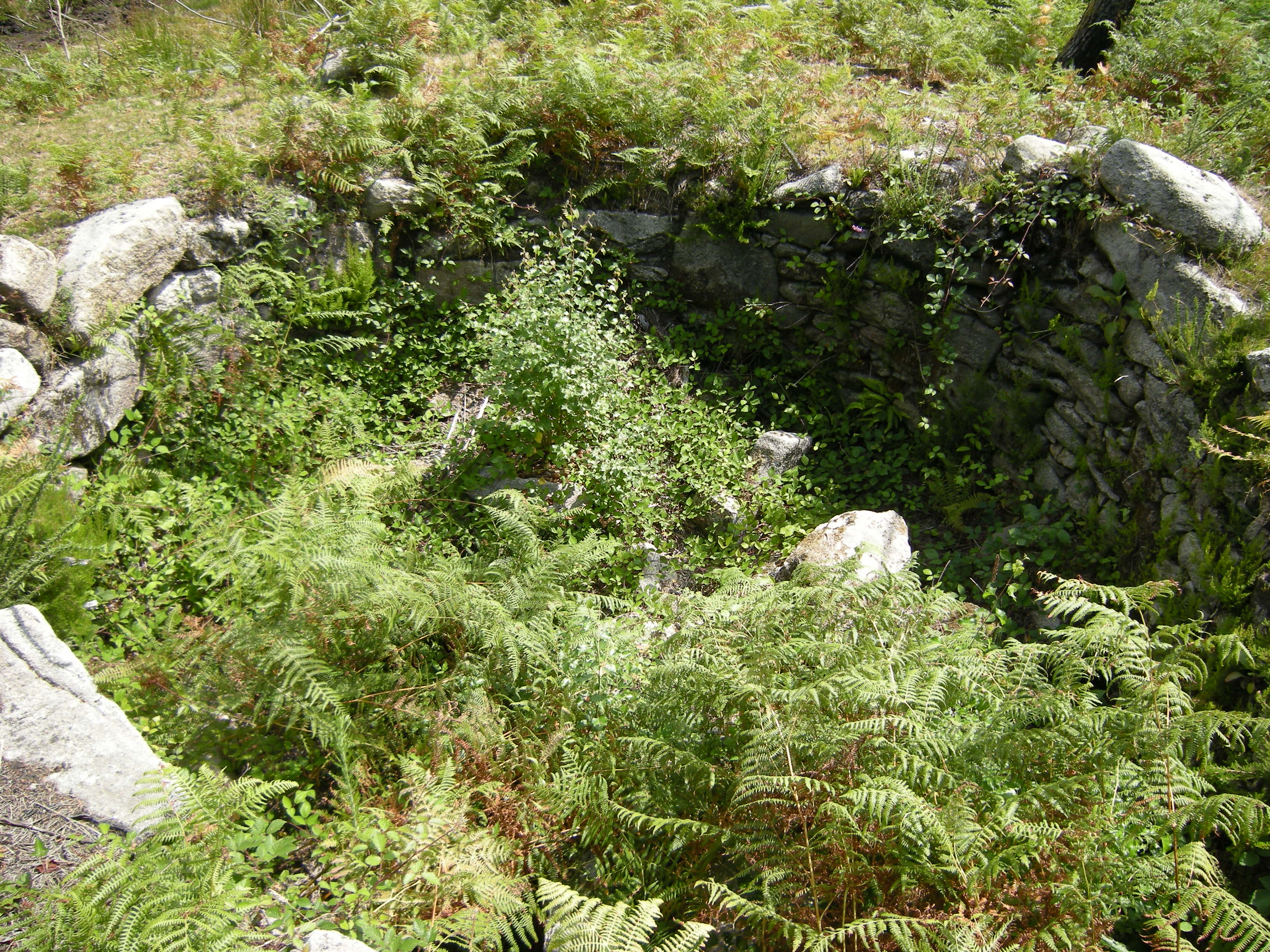 El Foxo do Lobo (Foso del Lobo), es una construcción tradicional empleada en el medio rural para la caza del lobo o de cualquier otro animal considerado dañino o peligroso. Consta de un par de muros en forma de embudo que en su parte más estrecha tiene un pozo o foso de gran altura para que el animal no pudiera salir. Los vecinos se organizaban en grupos para asustar al lobo haciendo ruido y dirigirlo de ese modo al foso en donde caía y era finalmente sacrificado.